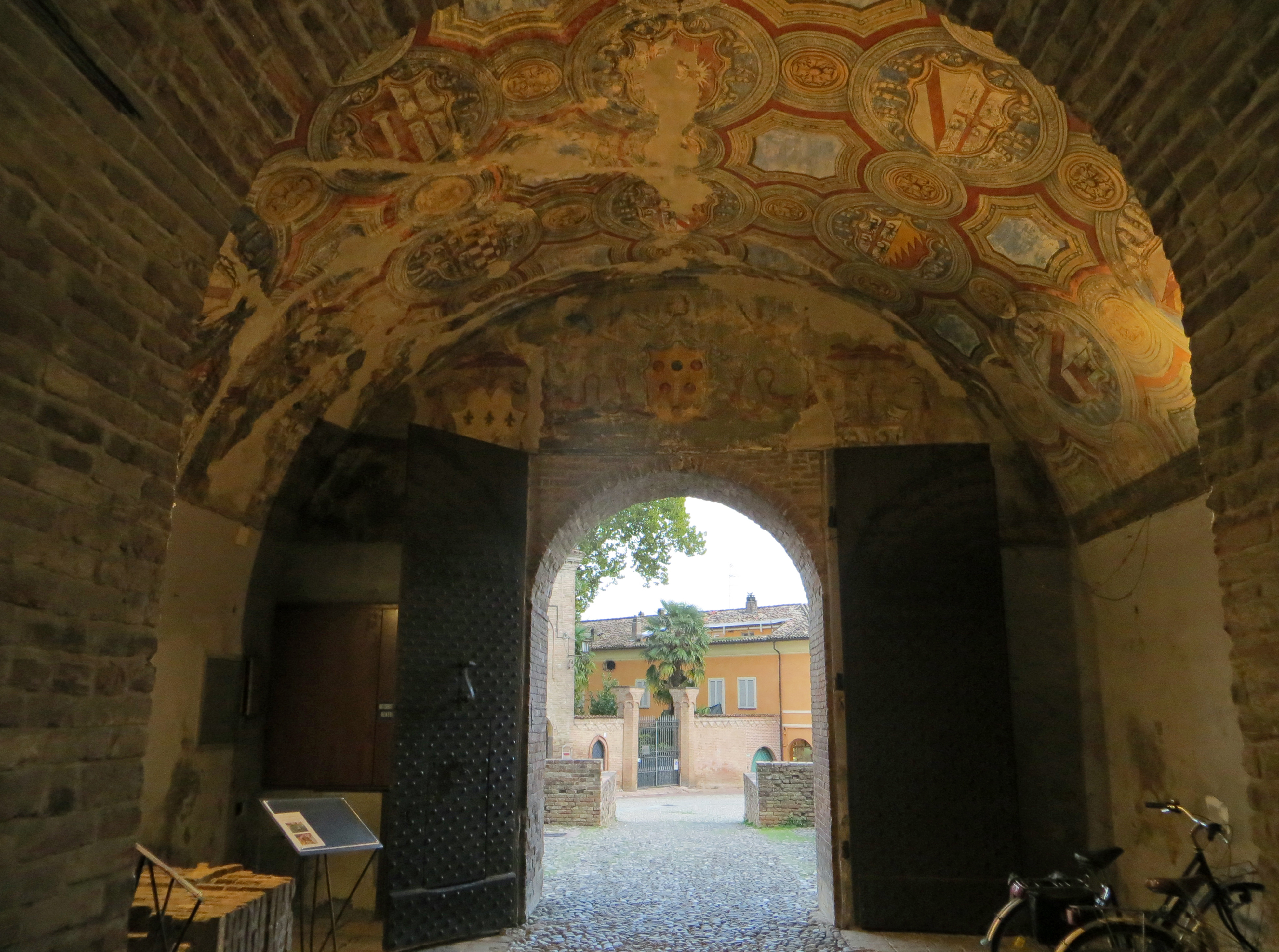 Rocca Sanvitale (Fontanellato) - androne